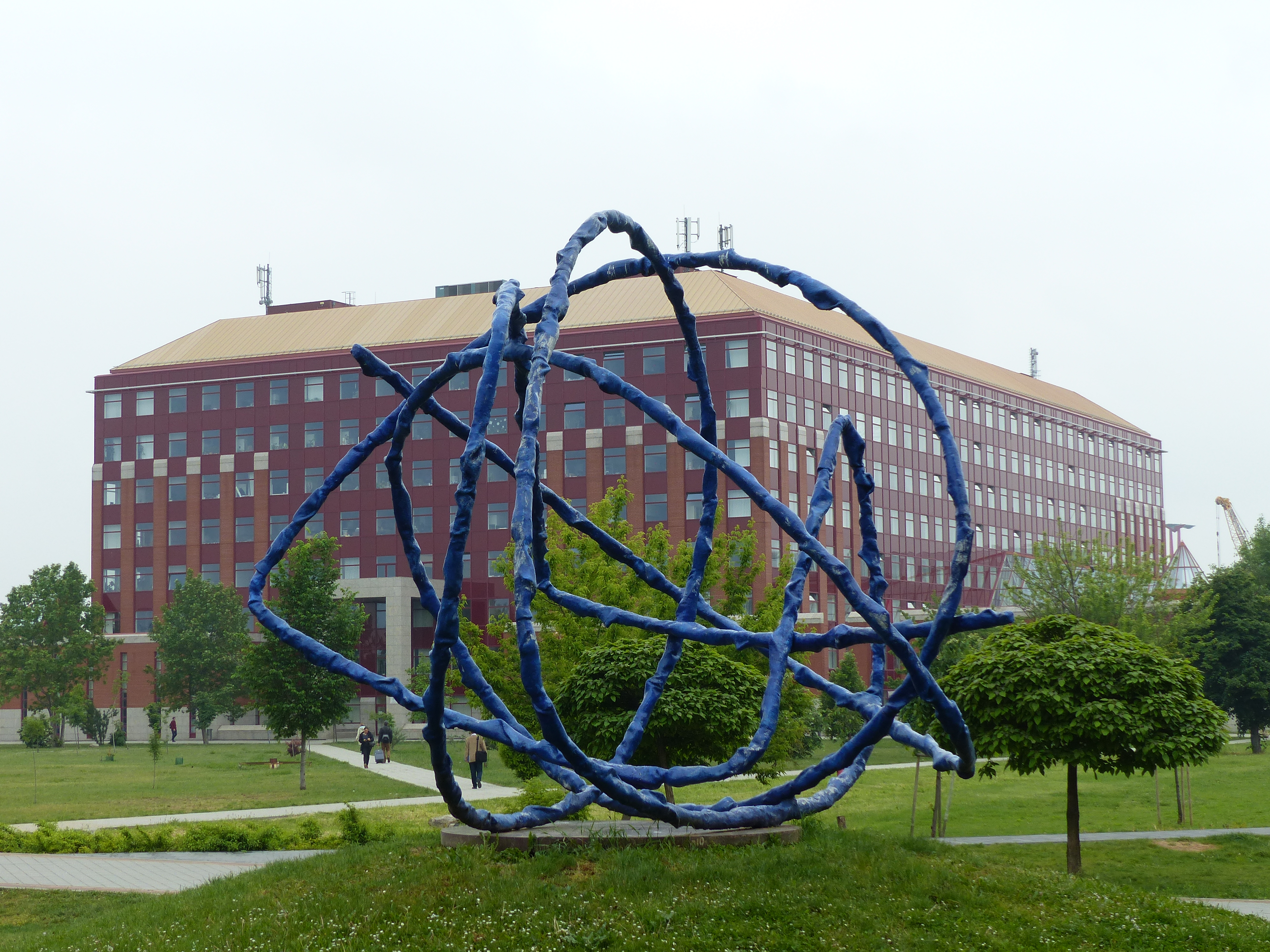 Nobel-díjasok emlékműve (avagy): Gubanc; A gondolat, mint téri út (Körösényi Tamás, 2002). - Budapest, XI. kerület, Magyar tudósok körútja, Infopark.